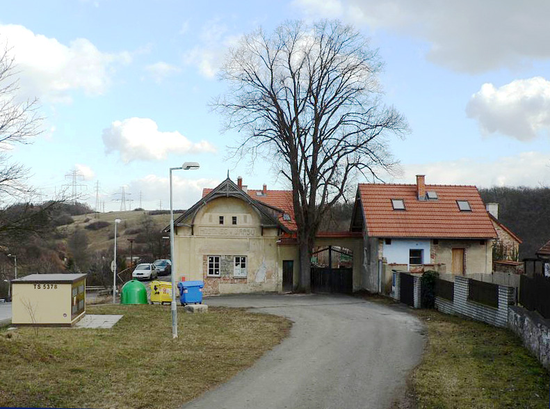 Zadní Kopanina, K Zadní Kopanině, U skopců čp. 5, bývalý hostinec.